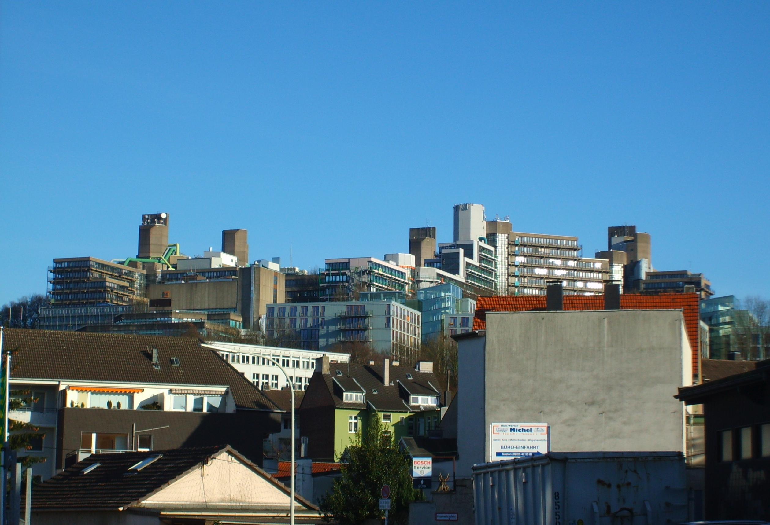 Universität Wuppertal von Nordwesten